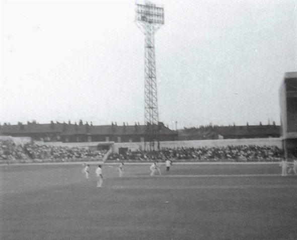 Bramall Lane